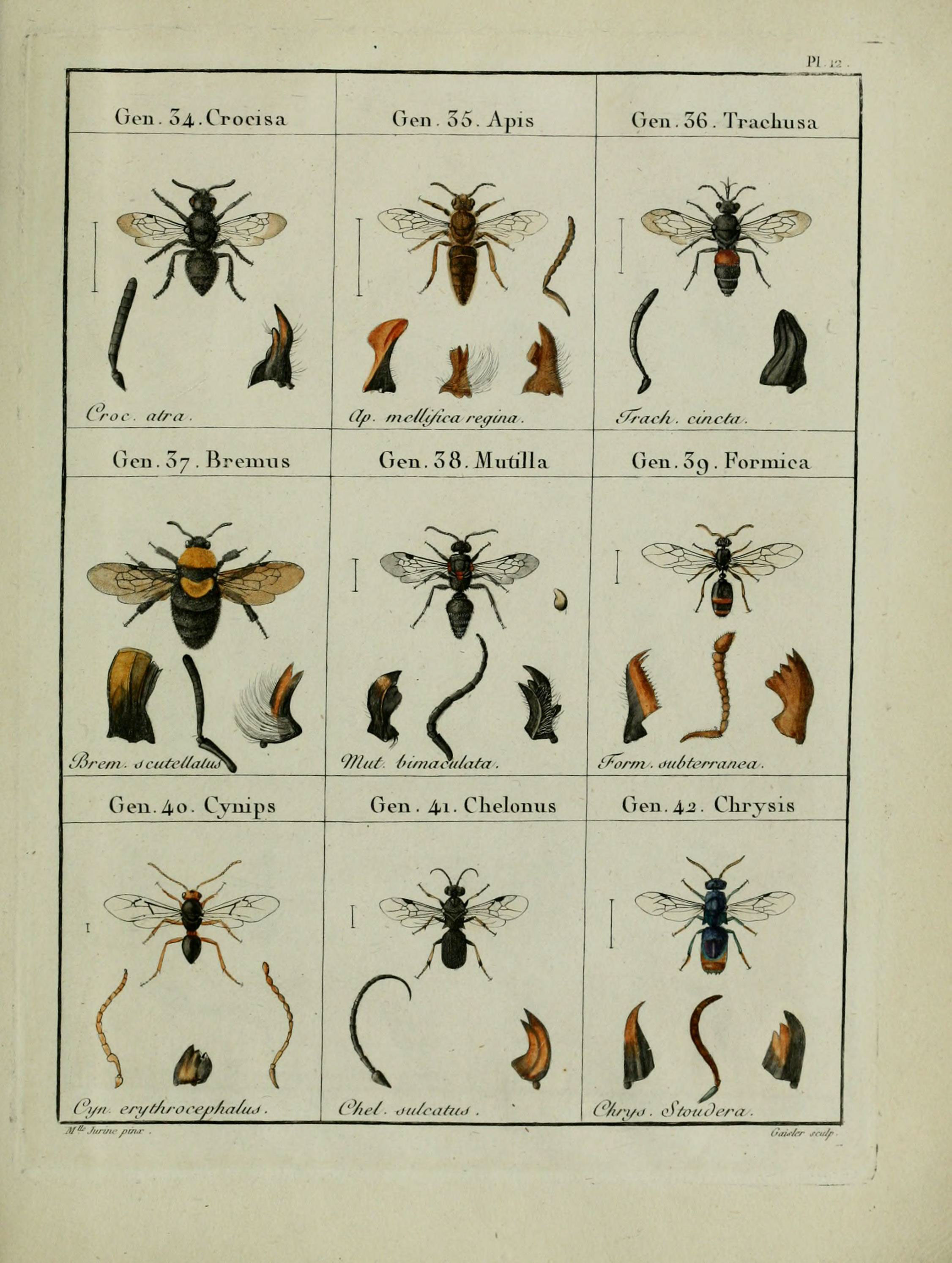 Oen. o4.-Crocisa G en. 35. Api li Croc. ,t/r. ^ç^^. oy . oremns î I i dp. mr//t/ùa /ei/f/uT . Gen. 38.Muti.la Gen . 56 . Tracliusi i/rac/i . cinchi . Gen . 5g . Forniic én.rm , iiti/yh'rra/wa . G eu . 4 o . Cynip s Gen. 4-1- Claelonus Gen. 4^- Clu'ysis â» (' I//I eri/f/u 1 . I •ty/iti/u ("/,.■/ .fu/va/a.. ^U C'/i/-i/,i. cS /ot/ih'ra